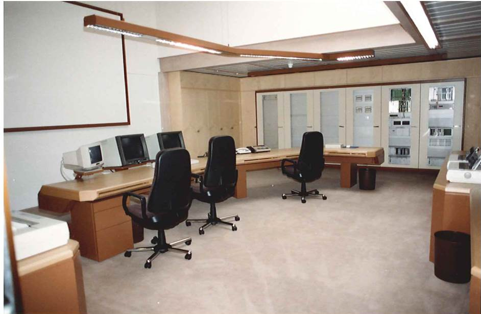 St. Moritz Energie: Die neue Netzleitstelle und die neue Betriebswarte wurden 1992 eingeweiht.